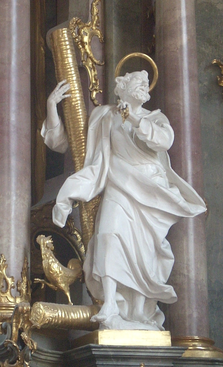 Oberammergau, St. Peter und Paul, Apostel Petrus mit Schlüssel, umgekehrtem Kreuz und Hahn (Hochaltar links)